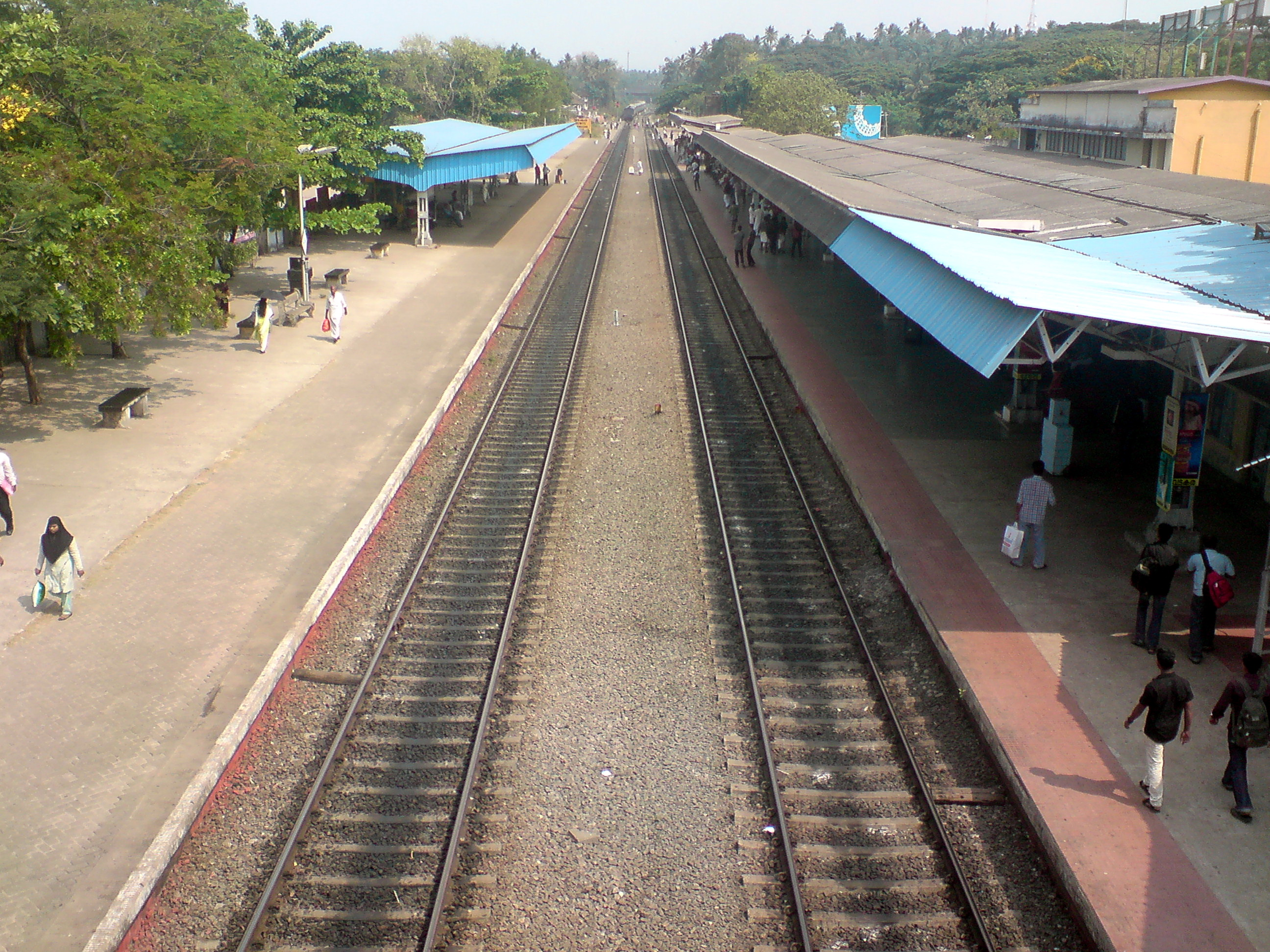 Vadakara railway station picture taken from the railway bridge